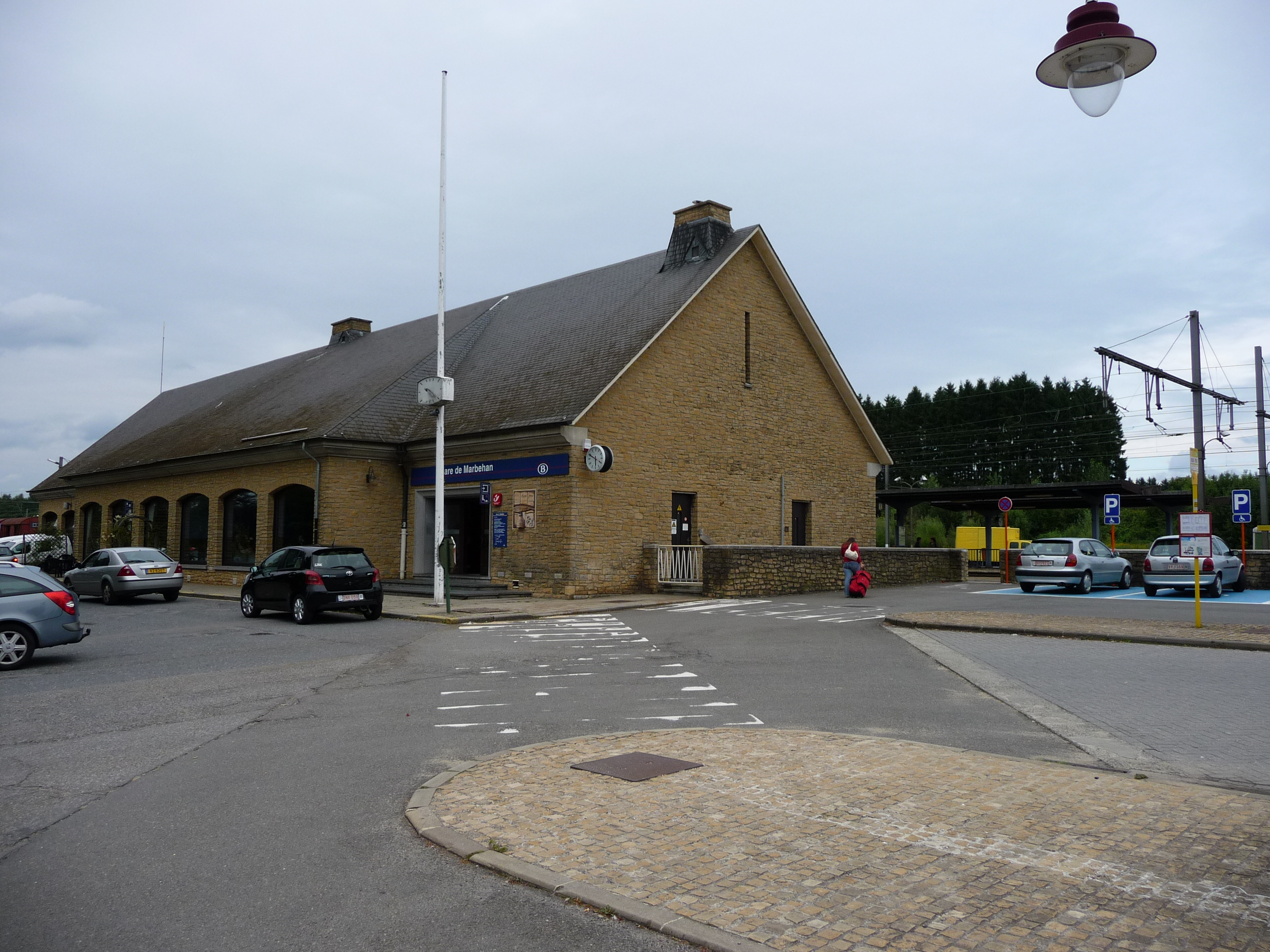 Gare de Marbehan, vue depuis la rue / Marbehan station (Belgium) : view from the street